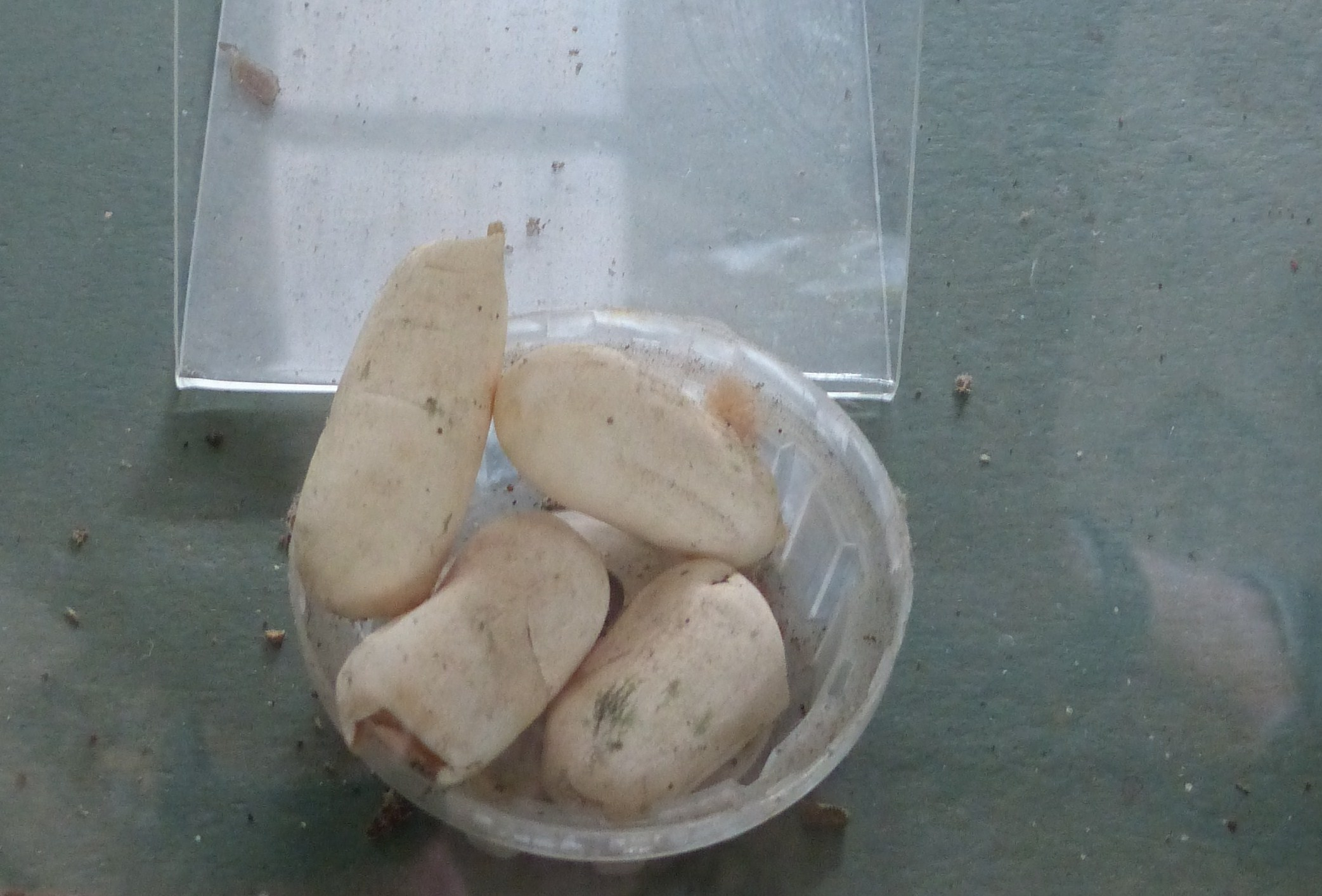 Cutted out of image: File:Oxybelis fulgidus eggs.JPG. Edited by B kimmel